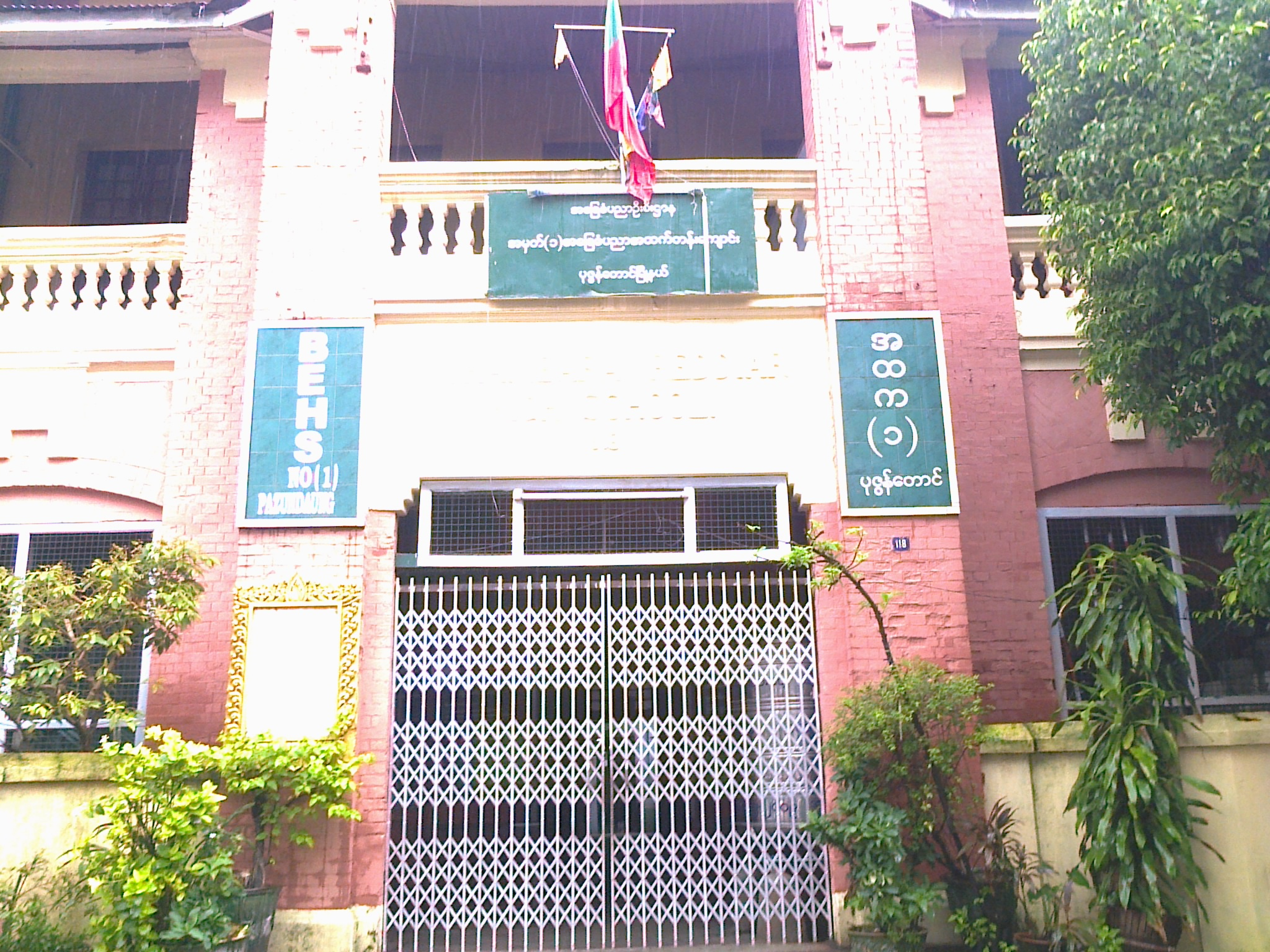 မြန်မာဘာသာ: အ.ထ.က(၁)ပုဇွန်တောင်